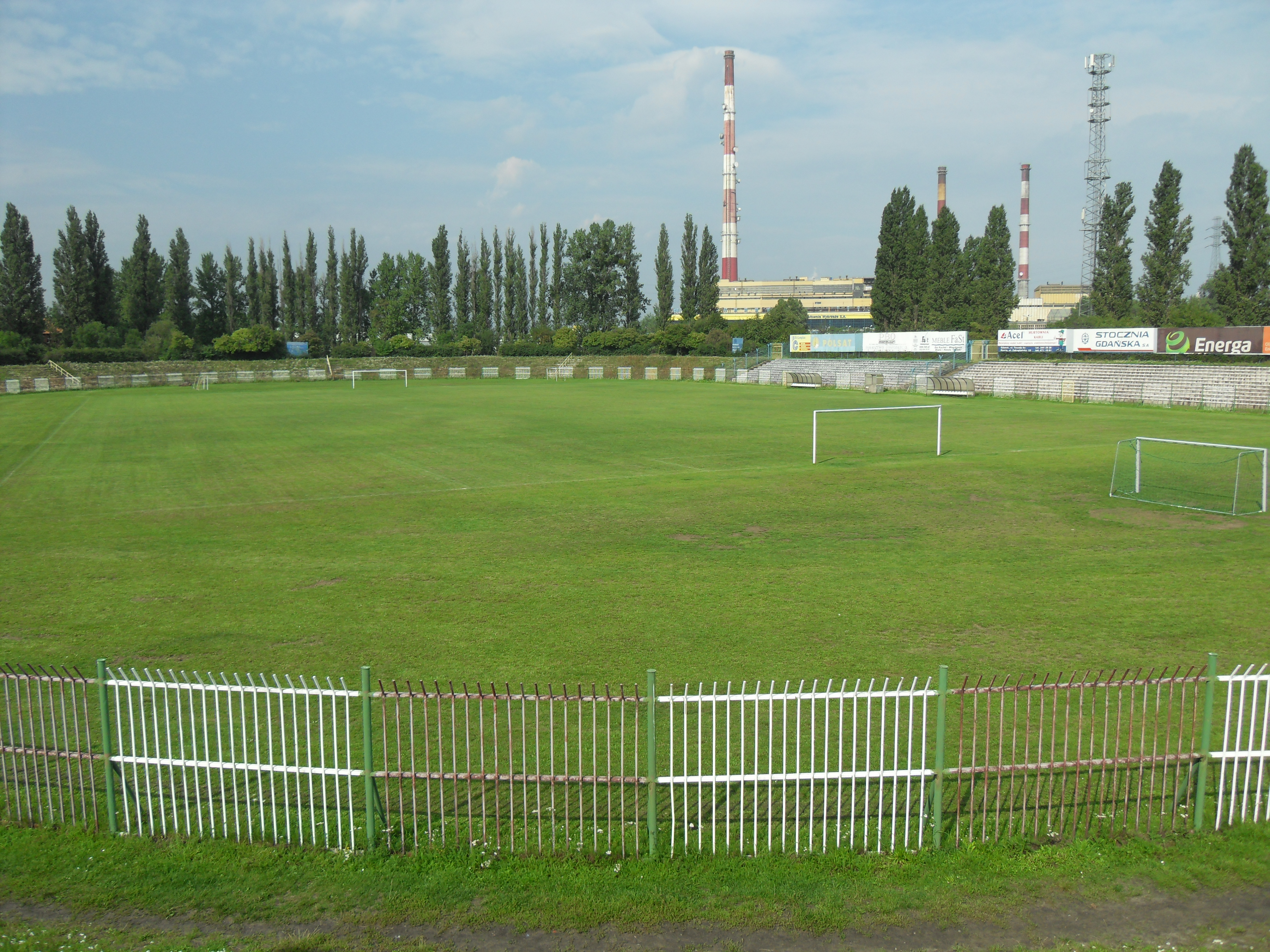 Gdańsk Młyniska, stadion SKS Polonia Gdańsk.